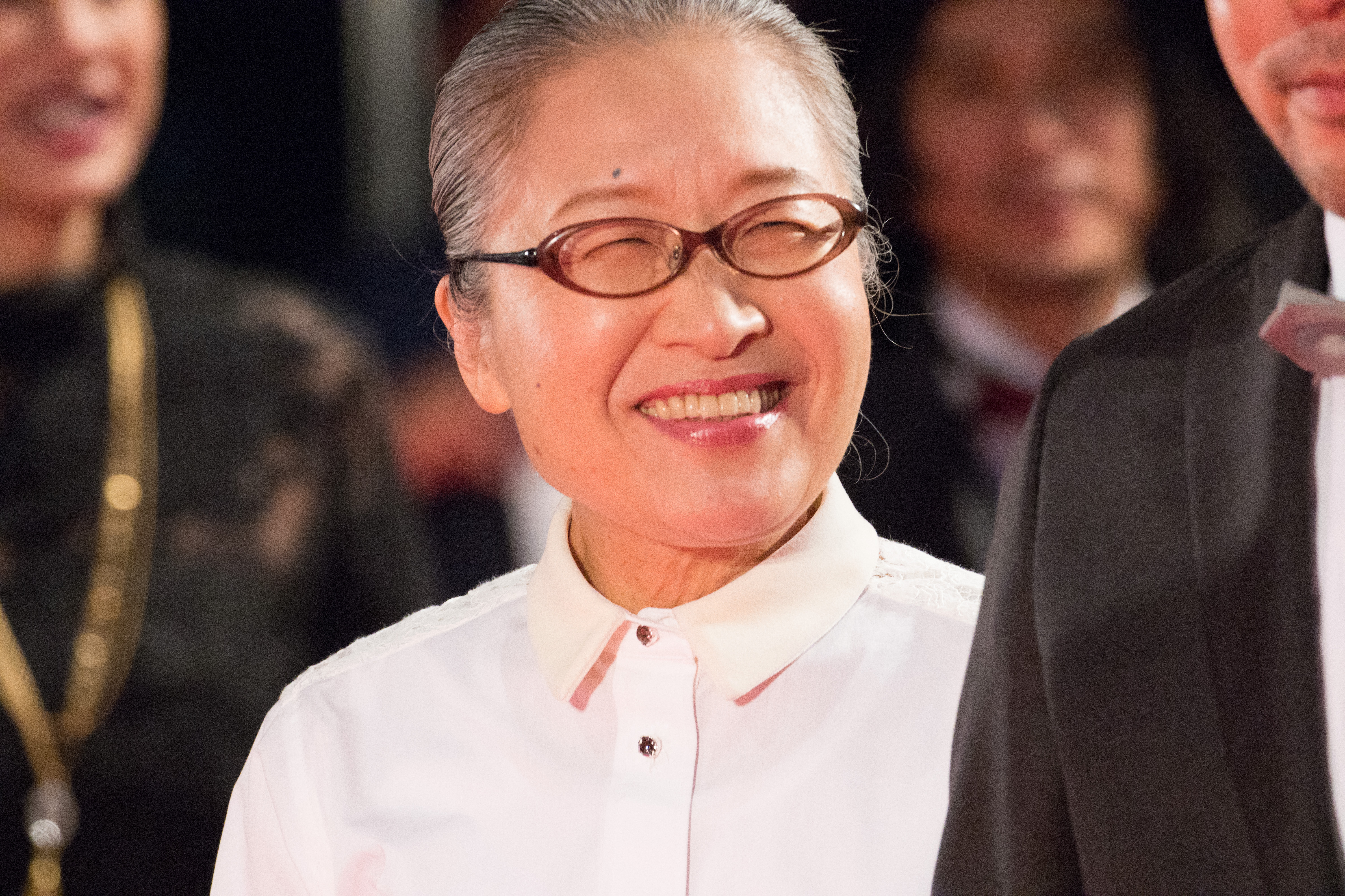 第29回 東京国際映画祭 オープニングセレモニー もたいまさこ (ハローグッバイ)